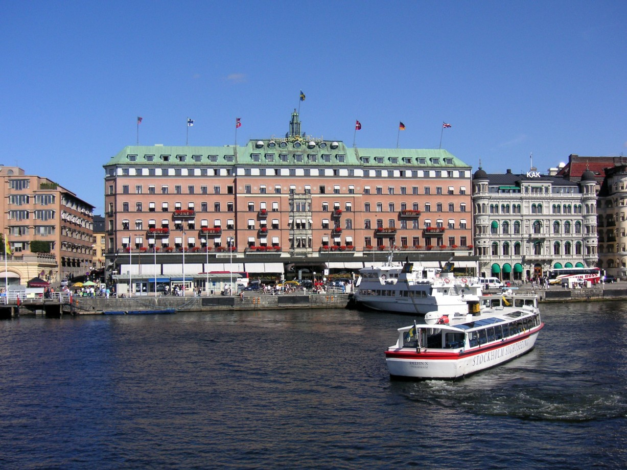 Stockholms Ström